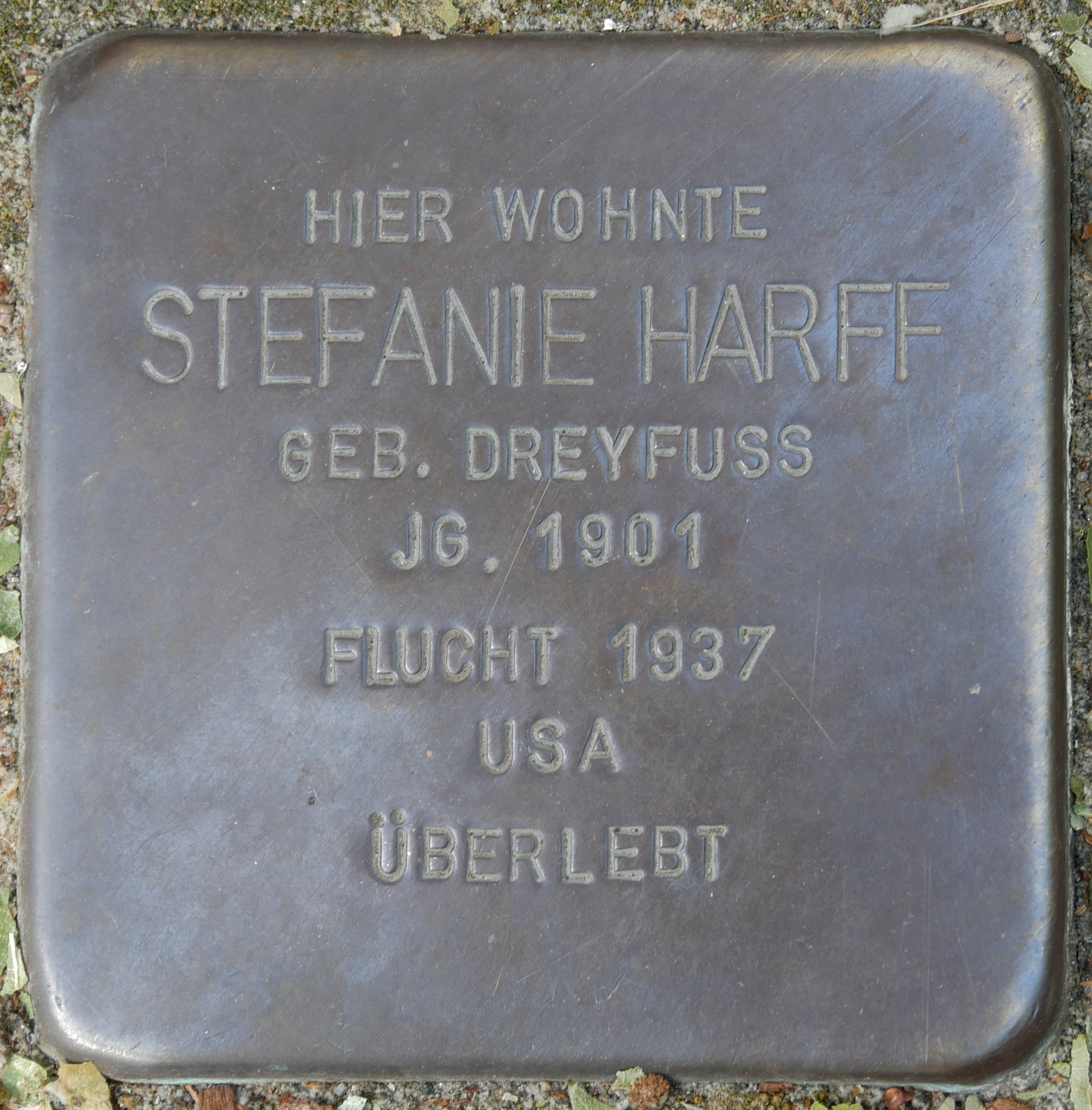 Stolpersteine Wesel: Harff, Stefanie